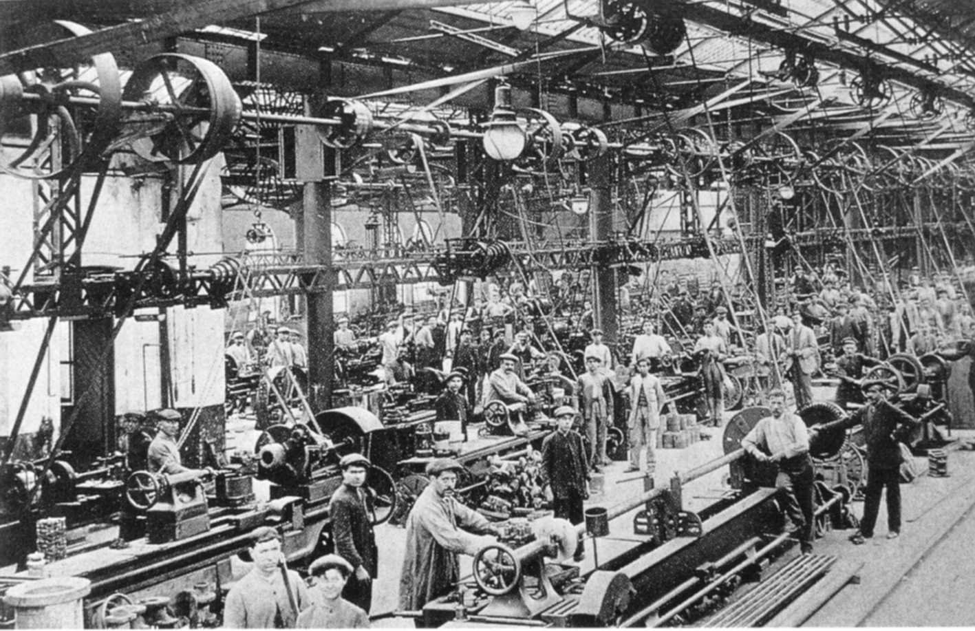 Uno de los talleres propiedad de la Riotinto Company Limited.